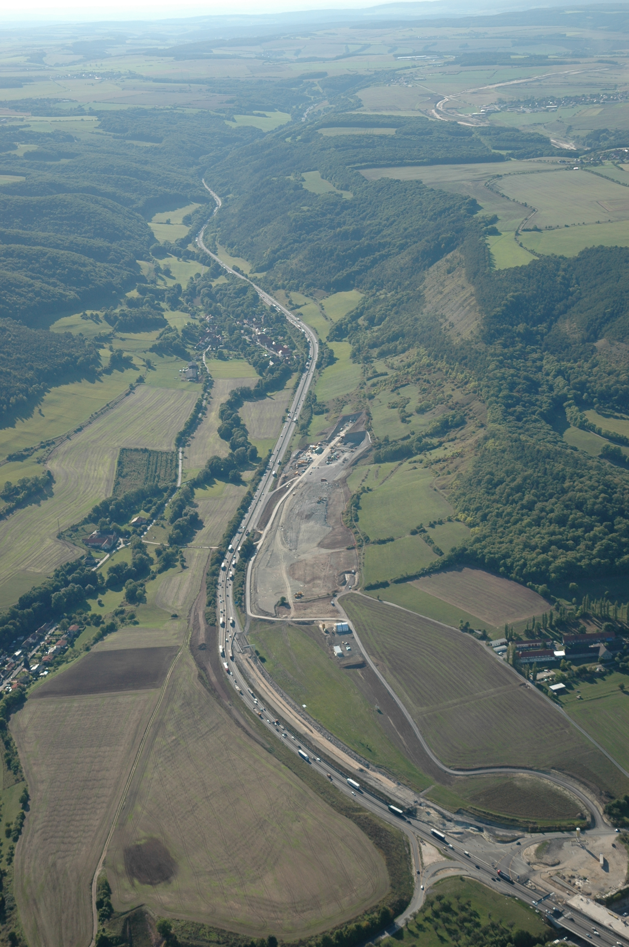 Jagdbergtunnel A4 bei Jena - Luftaufnahme mit den beiden im Bau befindlichen Tunnelportalen